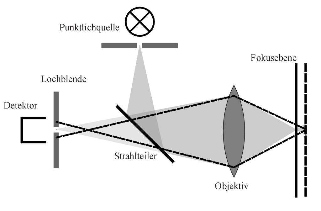 Schema konfokales Mikroskop